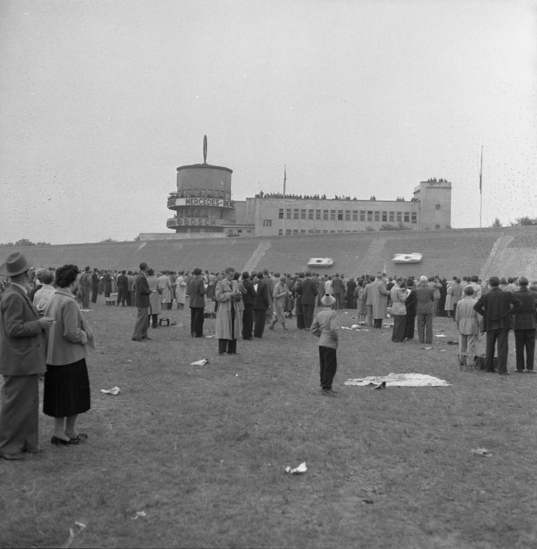 Autorennen Avus Berlin an der Zonengrenze